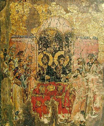 ПРИЧЕСТУВАЊЕ НА АПОСТОЛИТЕ